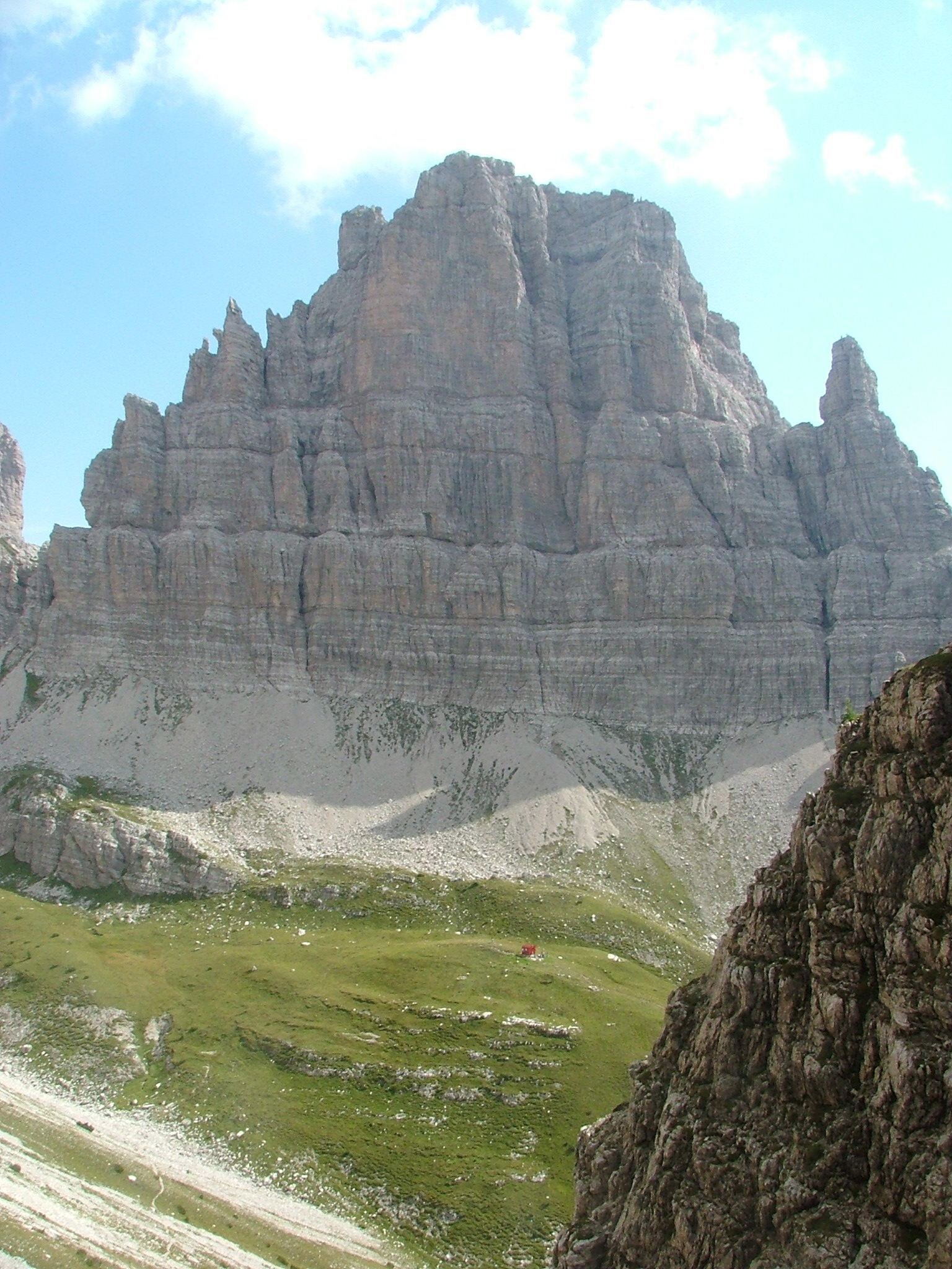 Croda Montanaia, Val Montanaia, Cimolais, Pordenone, Italy